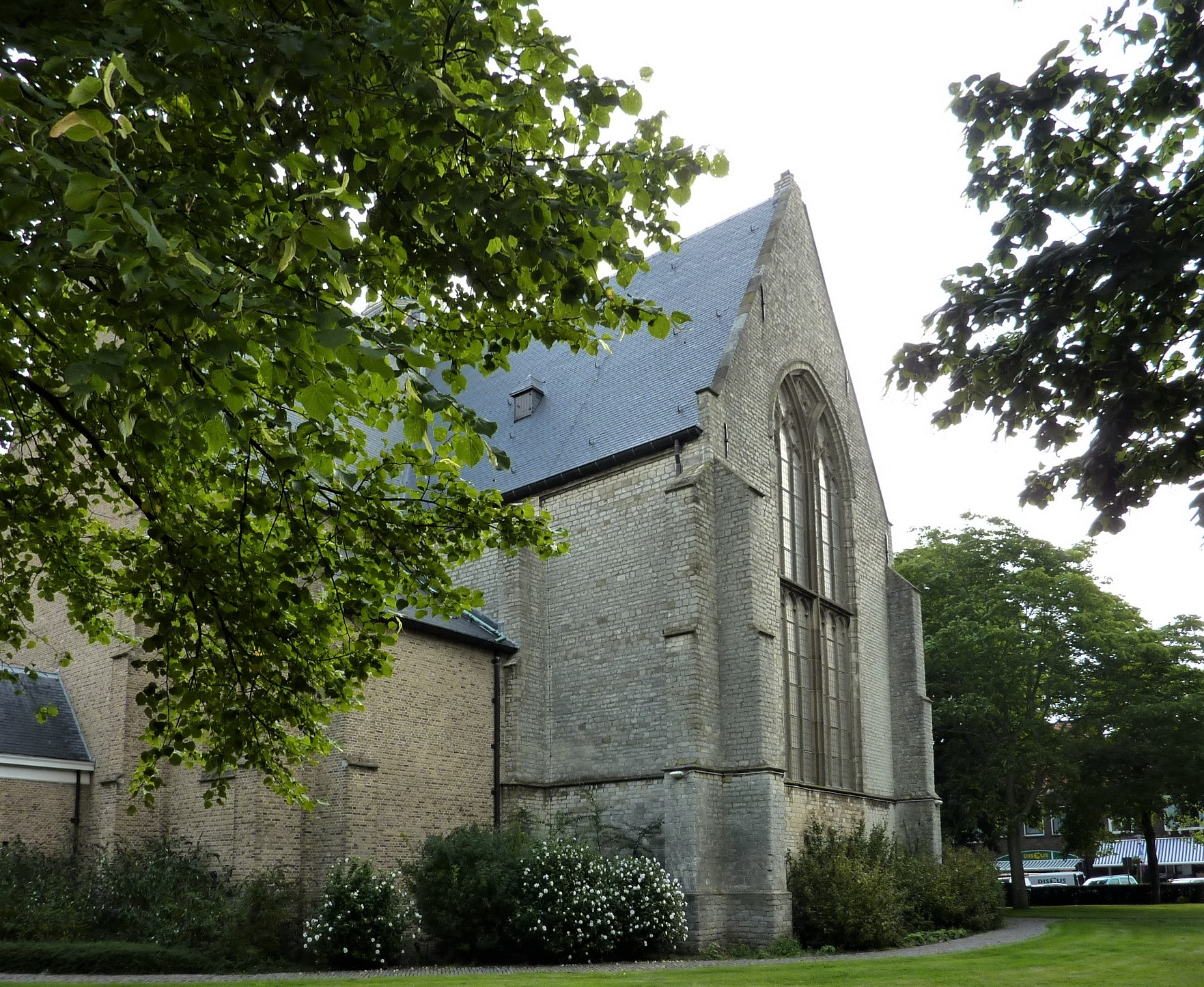 Odulphuskerk (Yerseke)